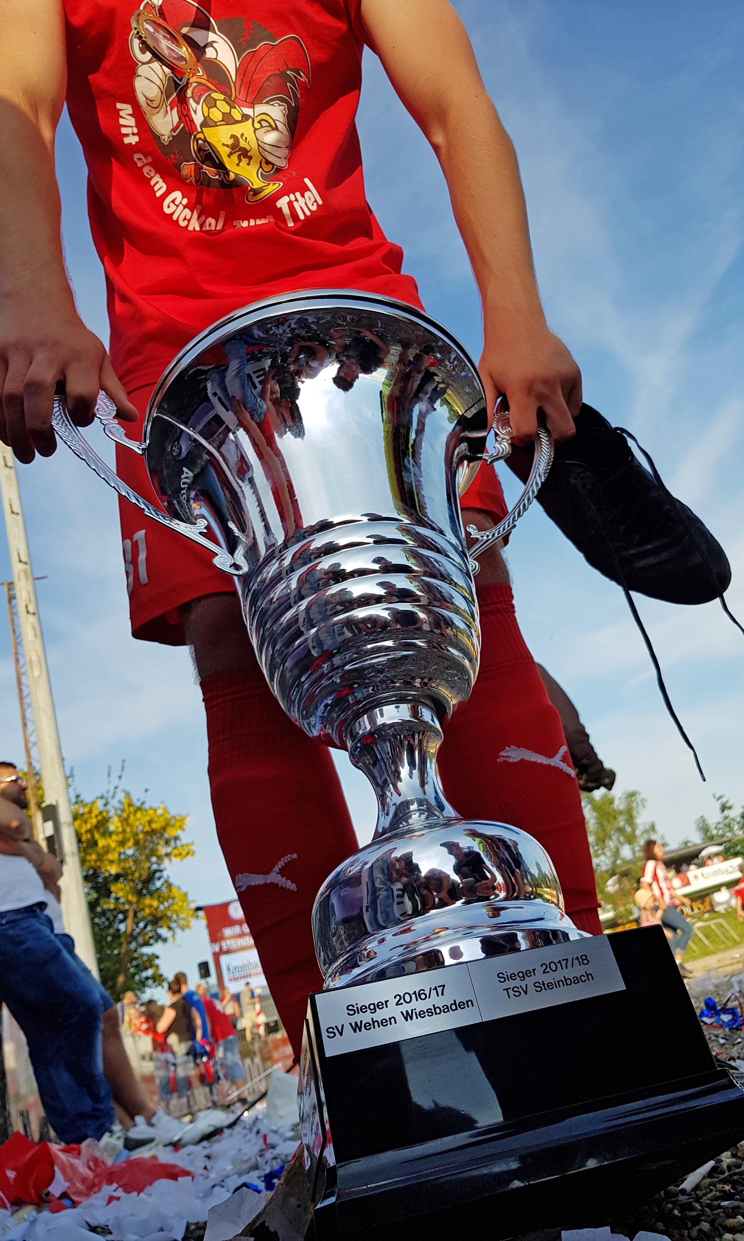 Hessenpokal (2018)